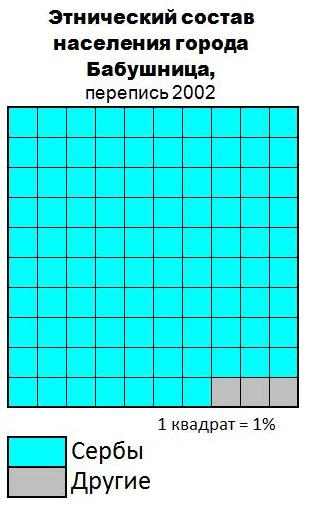 Этнический состав населения города Бабушница (2002)